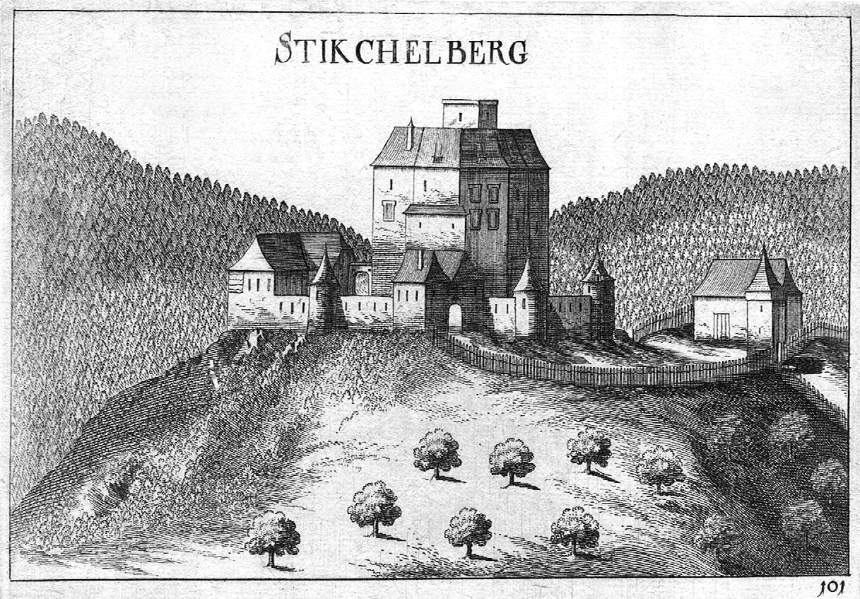 Topographia Austriae superioris modernae – Tafel 101: Burg Stickelberg